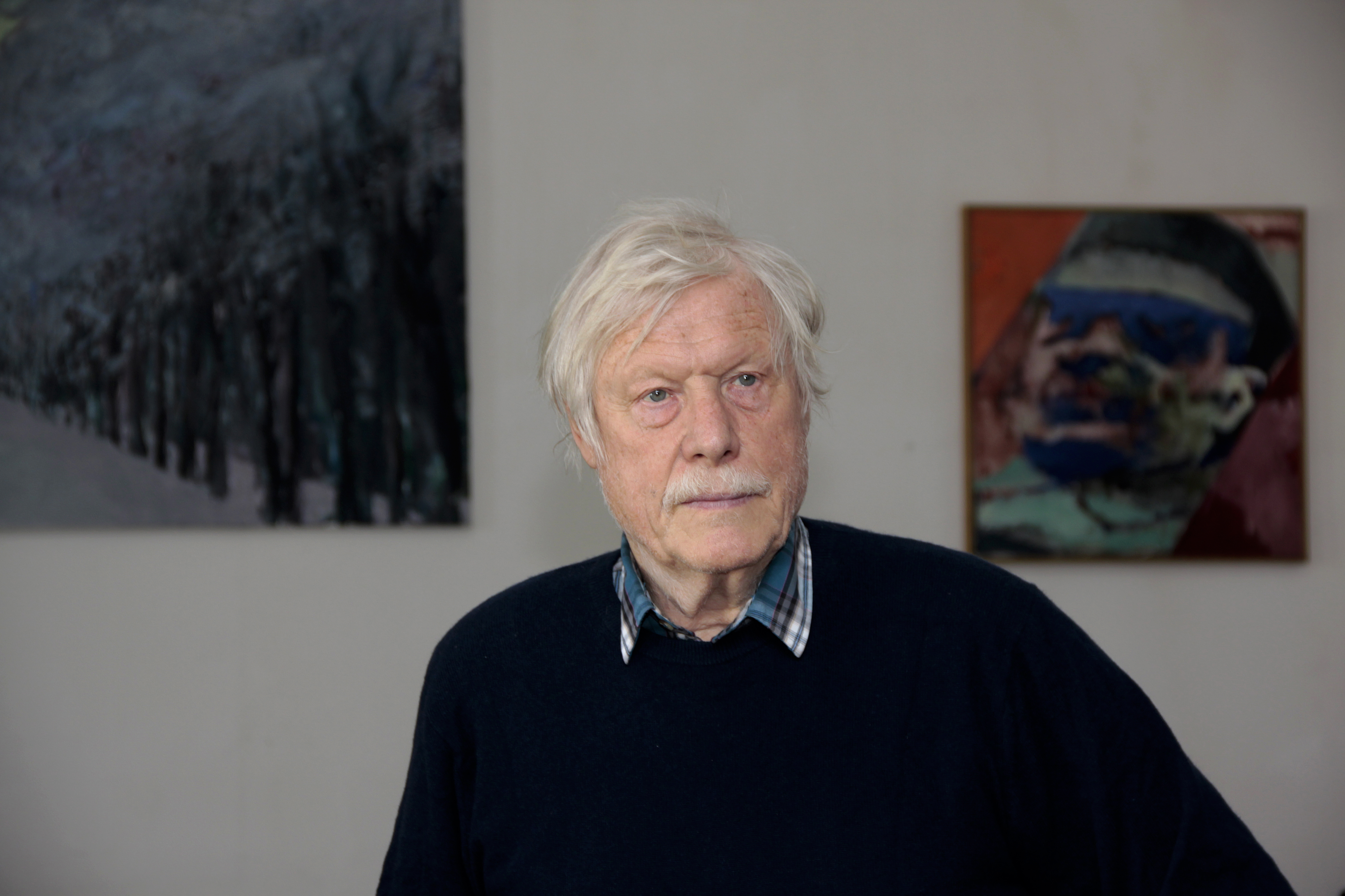 Maler